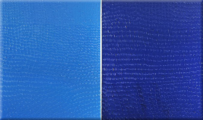 "Big, bang, blue" (2007-08). Óleo / lino - 193x386 cm.